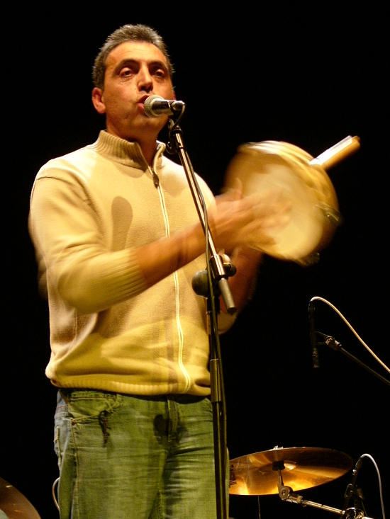 valencian folk singer Pepe Botifarra live in Dénia